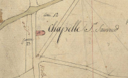 Canomals, de Bonpàs, en el Cadastre napoleònic del 1812 (Arxius Departamentals dels Pirineus Orientals)